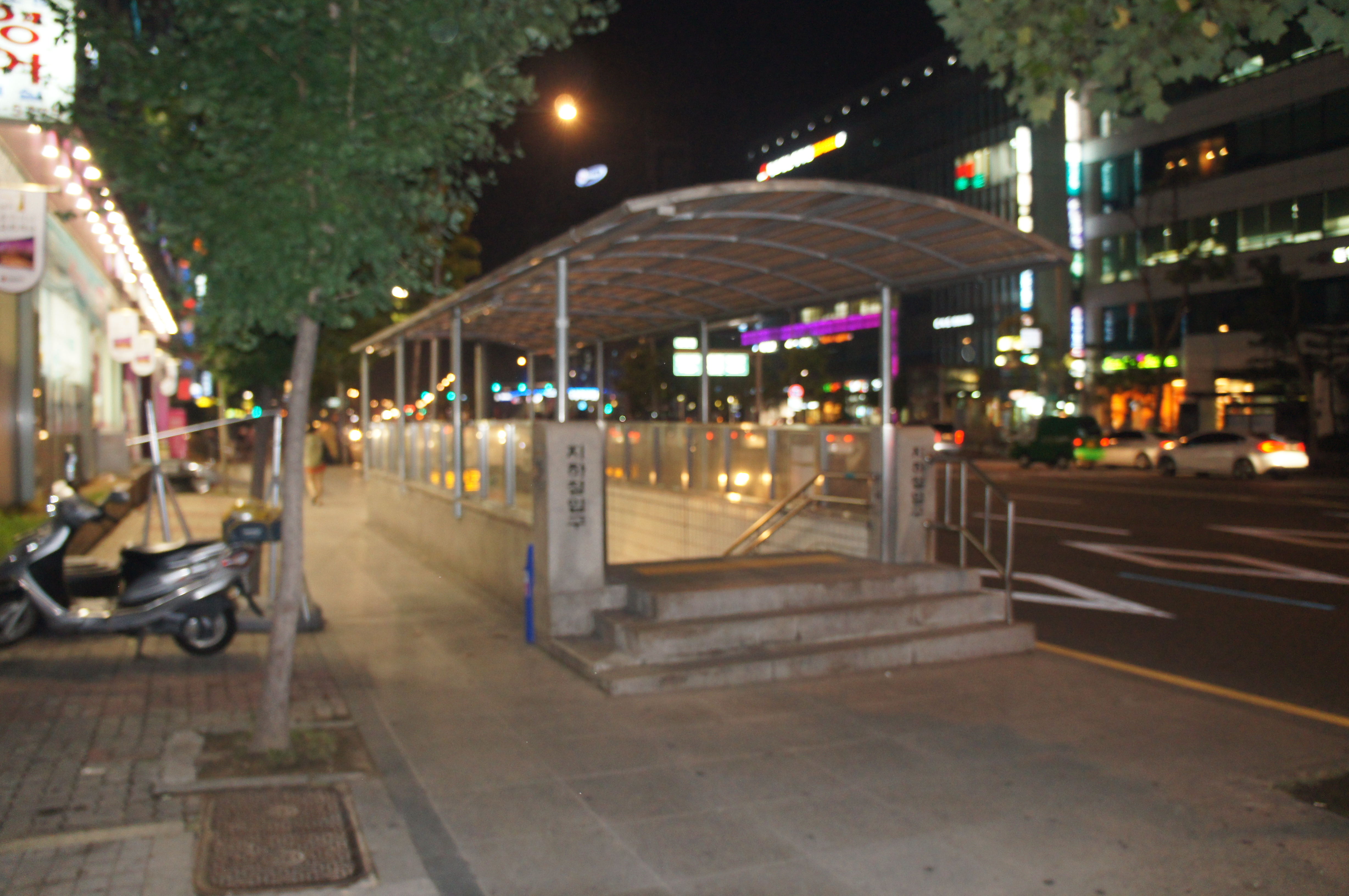 대치역 1번 출입구